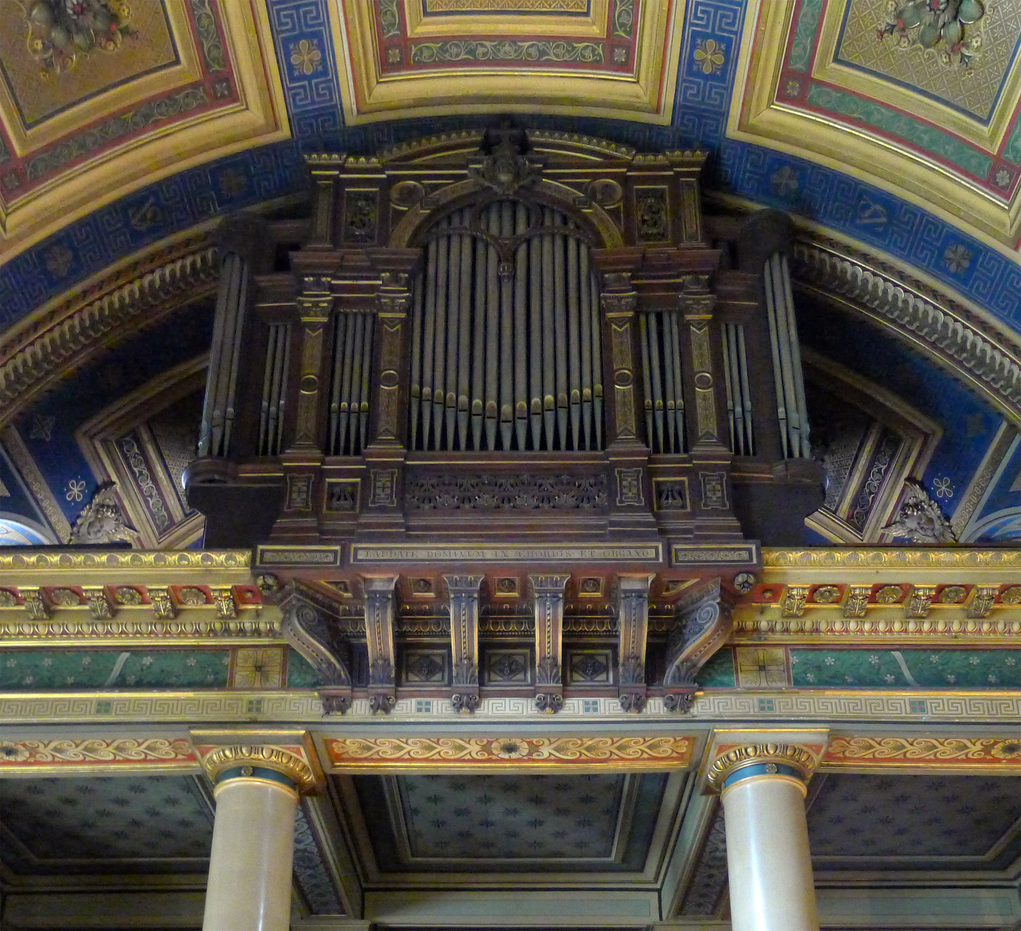 Chapelle Saint-Vincent-de-Paul (orgue) - Paris VI